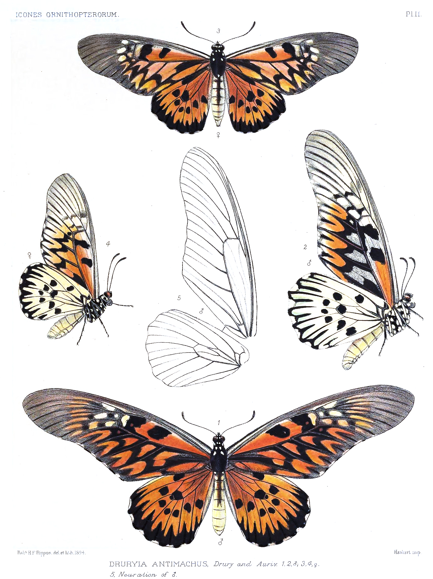 Druryia antimachus = Papilio antimachus